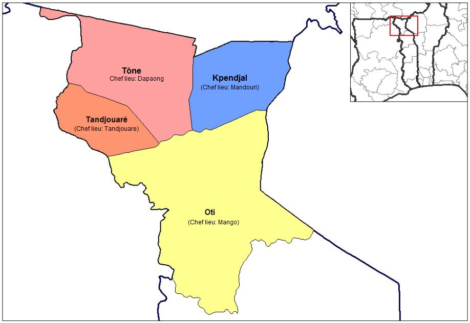 Les prefectures de la region des savanes